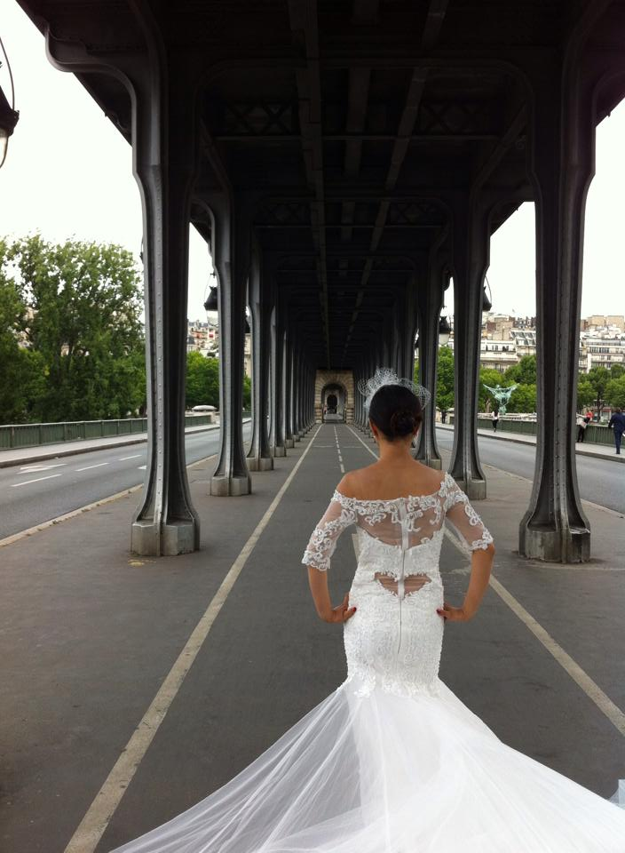 Une mariée à Paris, sous le Viaduc de Passy - Pont de Bir Hakeim